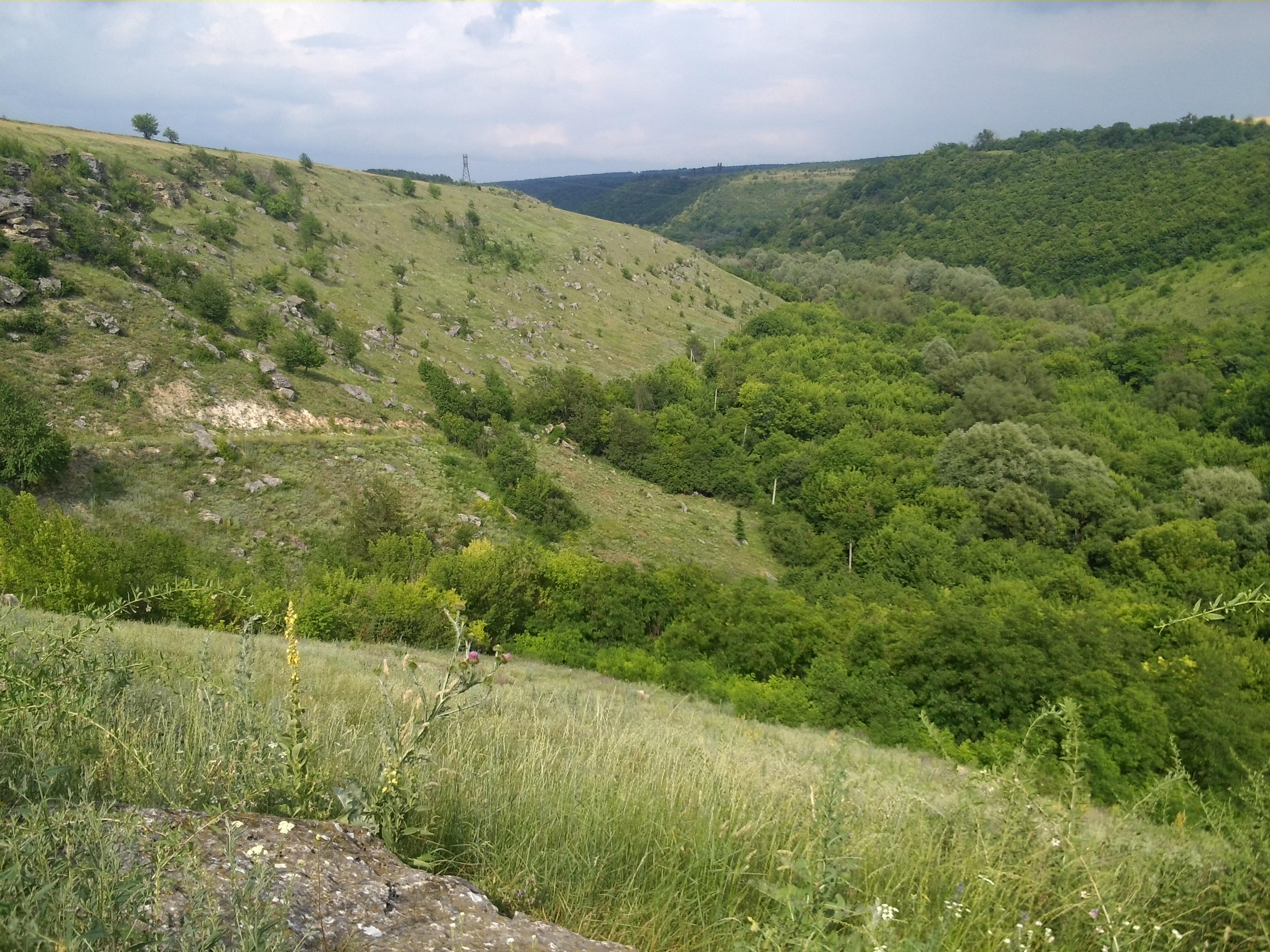 с. Дмитрашківка. "Зачарована долина"